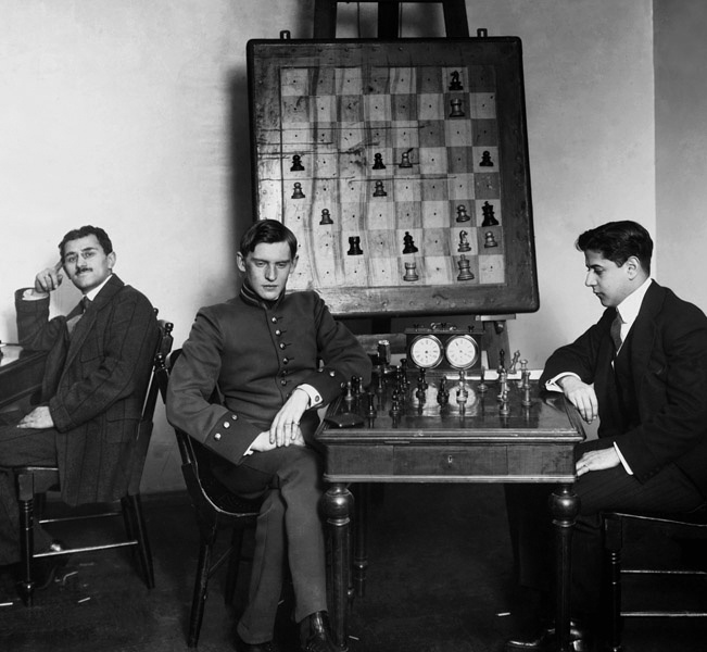 А. Алехин и Х. Р. Капабланка на шахматном турнире. Петербург 1914